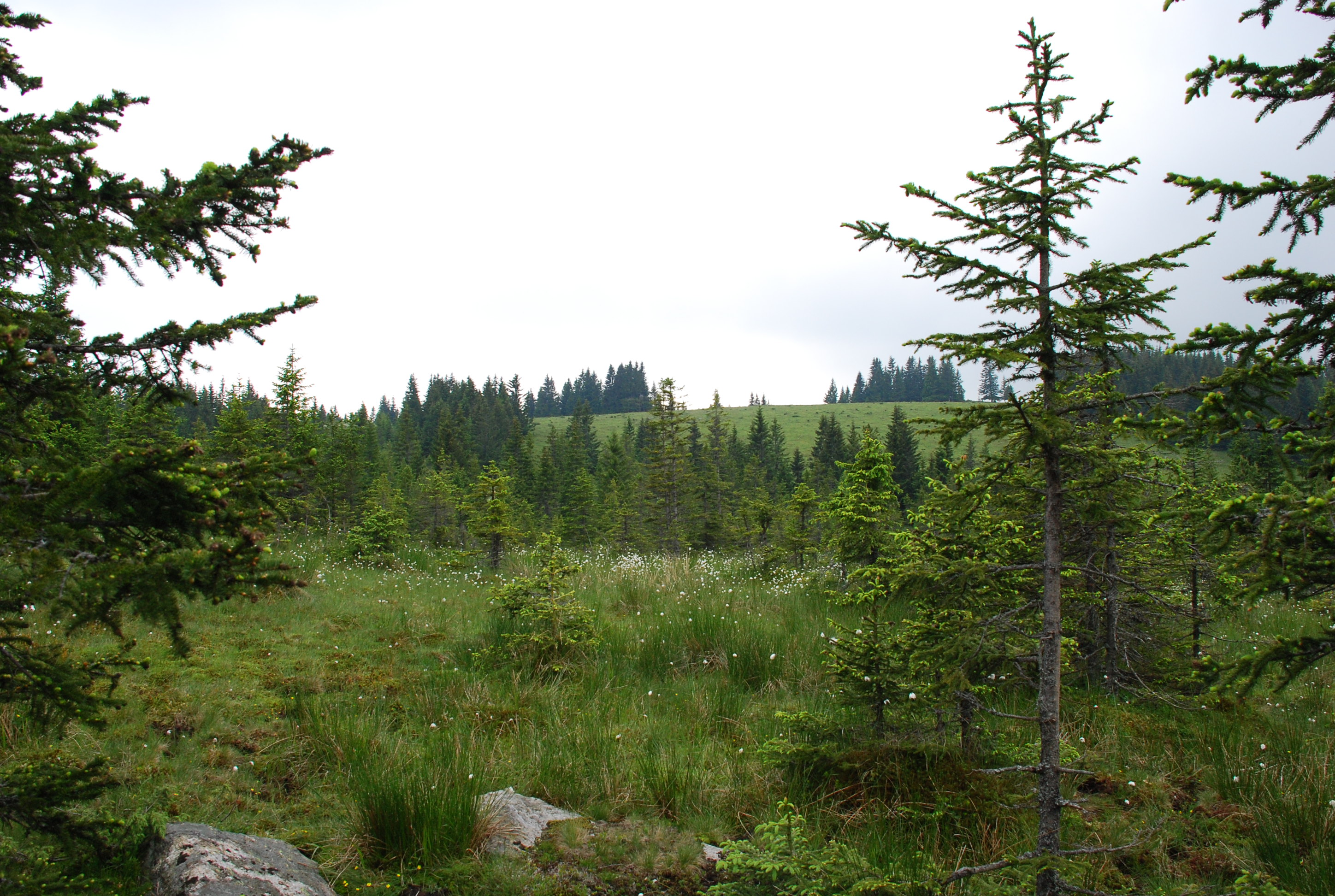 im Filzmoos auf der Hebalm, im Hintergrund der Blochriegel